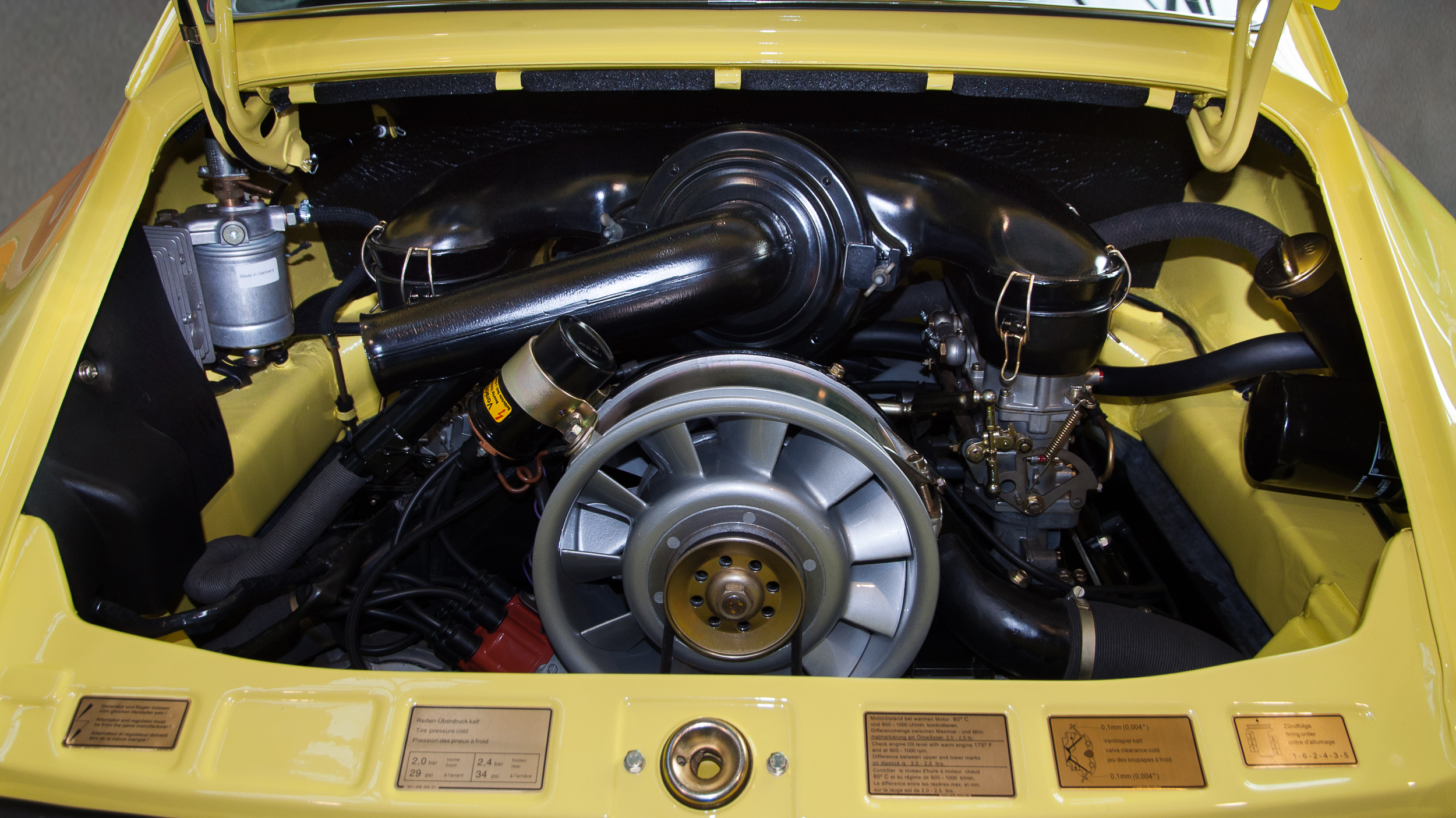 1973 Porsche 911 6-Zylinder Boxermotor